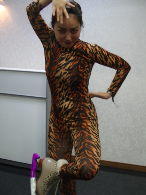 石井てる美 (2018年4月14日)